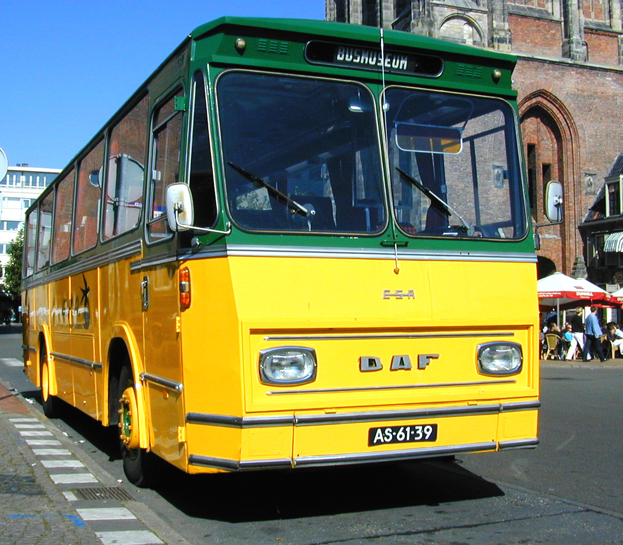 Elema-Stollenga's Autodiensten bus 156 van het ESA / DAF type SB1600DS470 te Groningen. [1]